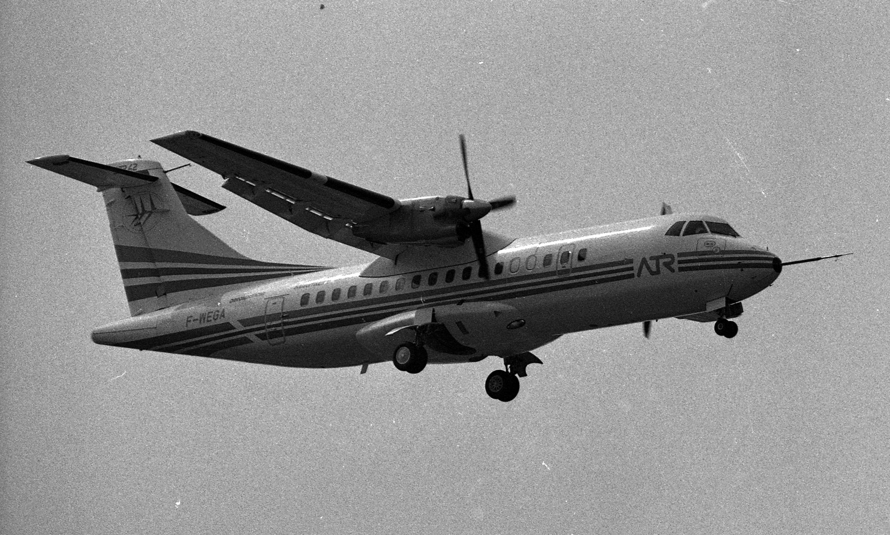 Pistes aérodrome Toulouse-Blagnac. 16 août 1984. Vue d'ensemble en contre-plongée de l'avion de transport régional ATR 42 en vol (vue de côté). Cliché pris le jour du 1er vol d'essai de l'ATR 42. Observation: ATR 42 (Avion de Transport Régional de 42 places) : avion turbo-propulseur franco-italien qui s'impose que le leader sur le marché des court-courriers. Répartition des tâches entre le consortium franco-italien : fabrication du fuselage et de l'empennage (queue de l'avion) à Naples (acheminés par route jusqu'à Toulouse), fabrication de la voilure à Nantes et Saint-Nazaire, puis aménagement du cockpit et assemblage final à l'Aéropsatiale à Toulouse. Pour son 1er vol d'essai, avion piloté par Gilbert Defer. Concepteur de l'avion : Gilbert Cormery (ingénieur). Directeur général du GIE ATR : Henri-Paul Puel.